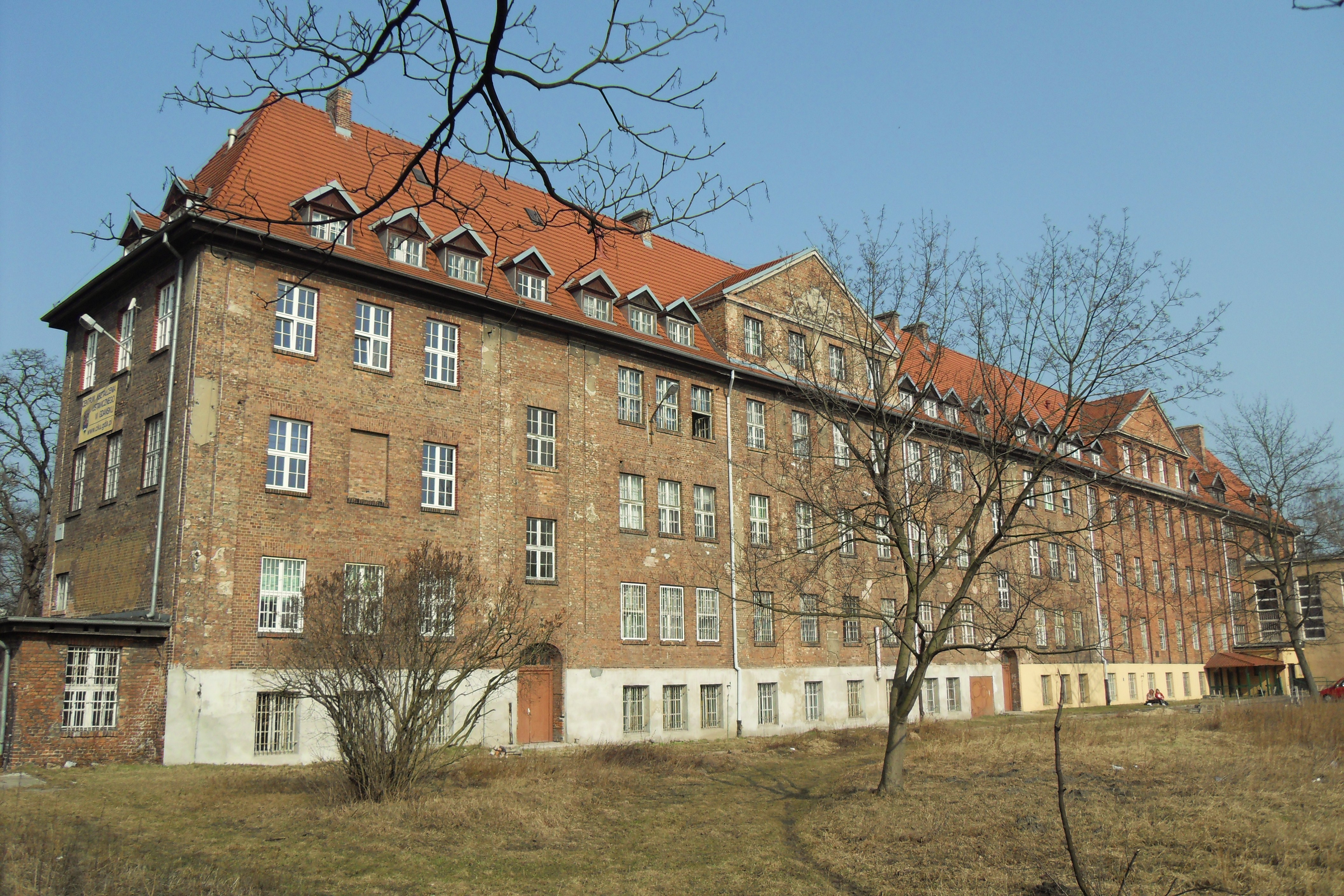 Gdańsk Zaroślak, ul. Augustyńskiego 1. Gmach zbudowany jako koszary, od 1922 szkoła.